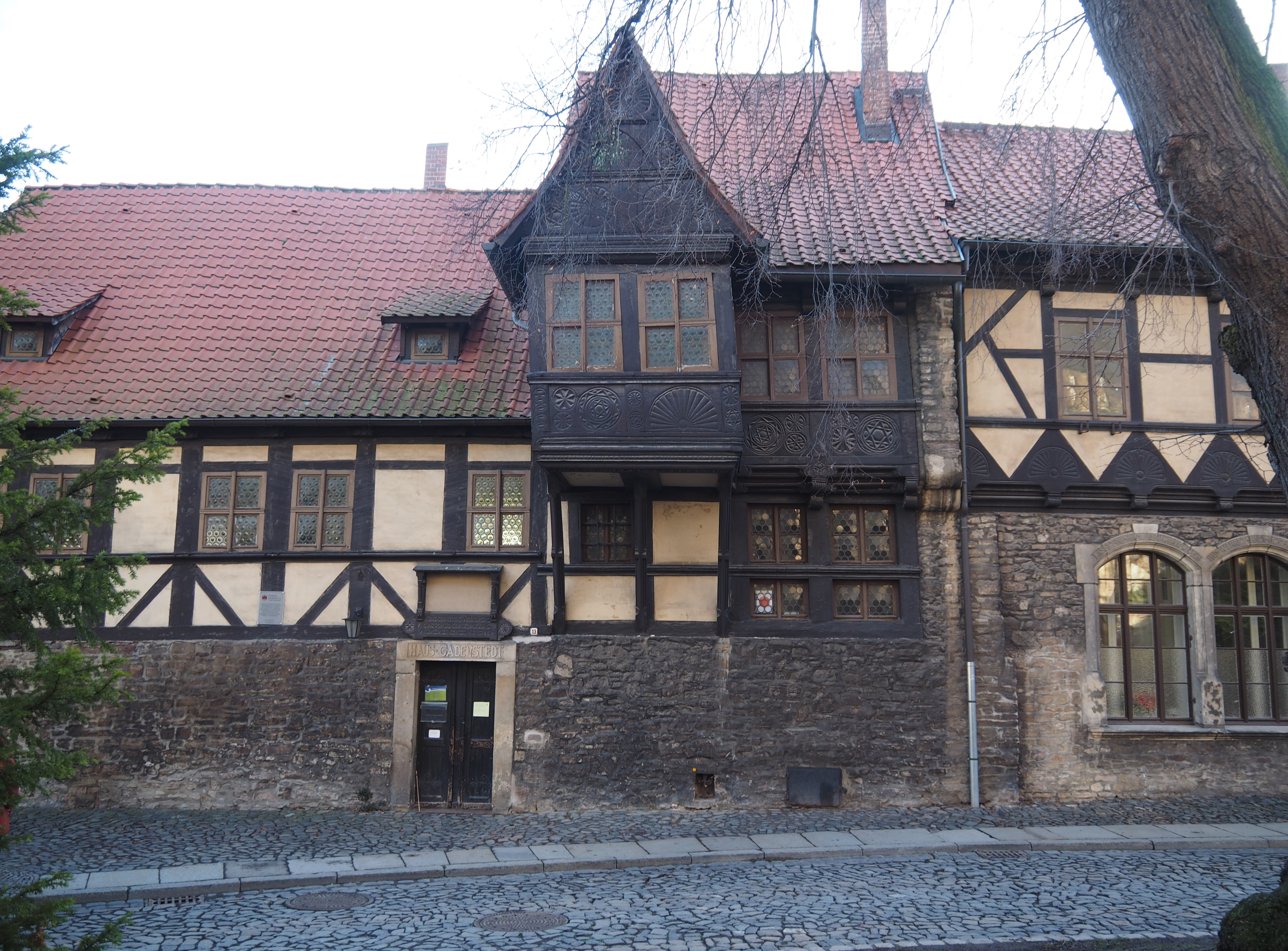 "Haus Gadenstedt", Gemeindehaus der Kirchengemeinde St. Sylvestri und Liebfrauen, Wernigerode